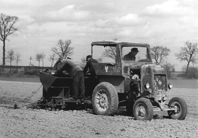 LPG Glaubitz, Kartoffellege Zentralbild Siegert-7.4.1953 Neuentwickelte Kartoffellegemaschine im Einsatz. Die MTS Nünchritz begann am 2. Osterferientag 1953 (5.4.) mit einer von unserer Industrie neu entwickelten Kartoffellegemaschine die Kartoffelaussaat auf den Feldern der Landwirtschaftlichen Produktiongsgenossenschaft Glaubitz. Die Kollegen der Genossenschaft waren besonders über die große Einsparung an Arbeitskräften erfreut und äußerten sich anerkennend über die Neukonstruktion.